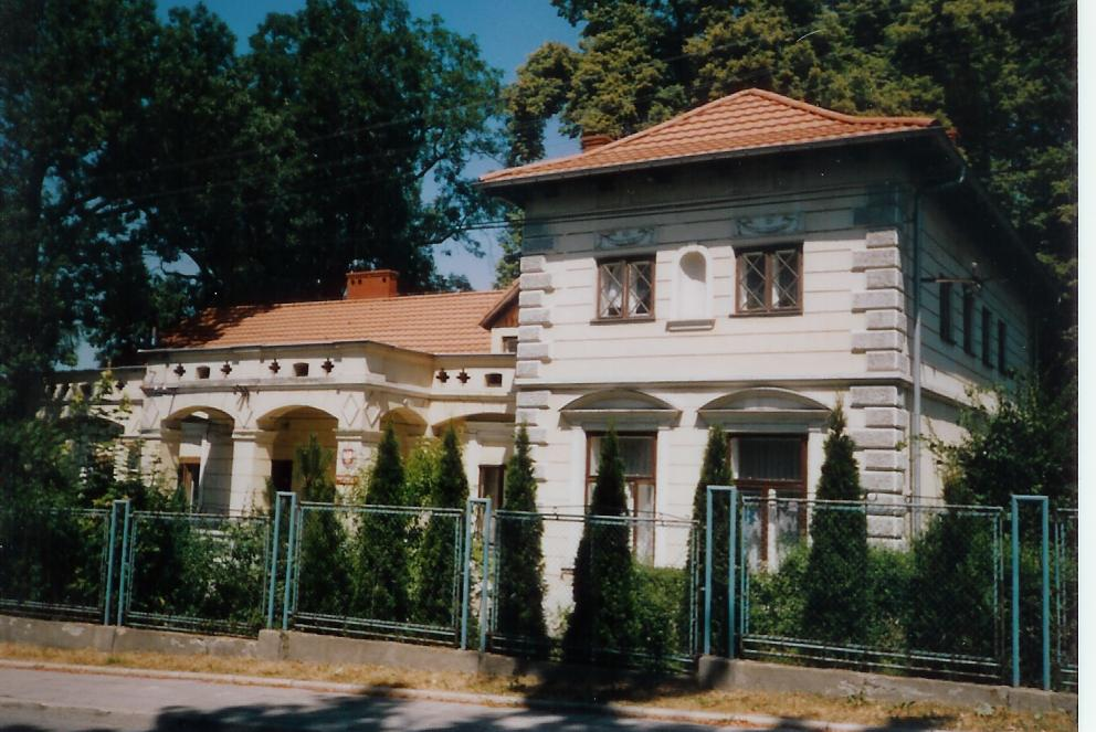 Zabytkowy dworek, obecnie przedszkole w Swoszowicach.